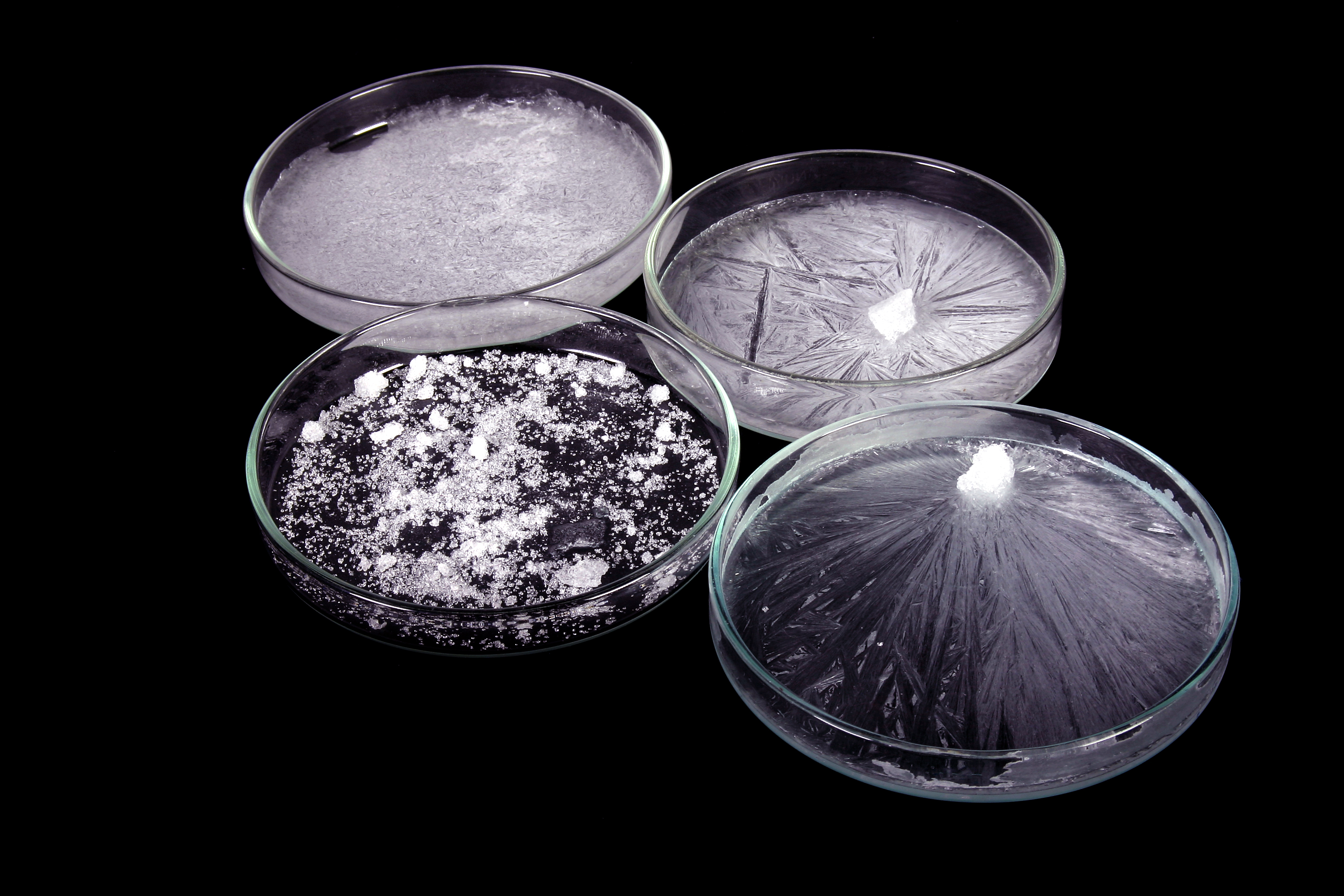 Kristalizacija natrijum - acetata (CH3COONa)